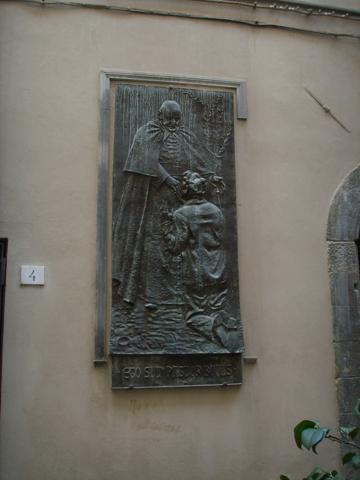 Piazza del giglio, targa giovanni XXIII